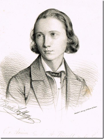 Lithografie des jungen Carl von Arnim